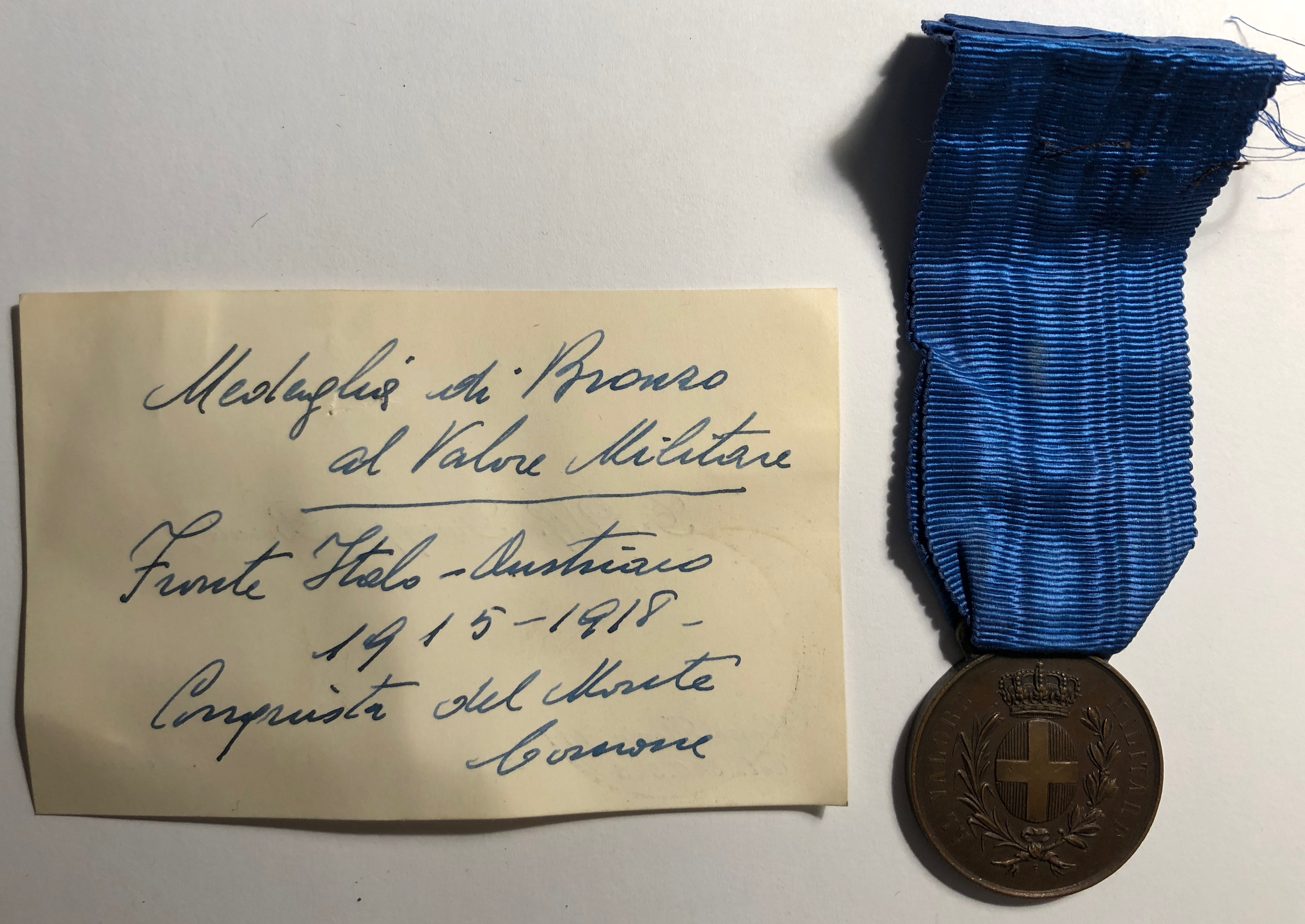 medaglia di bronzo al valor militare per le azioni intraprese sul monte cornone. Il biglietto è in calligrafia originale